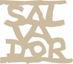 Salvador Vinyes